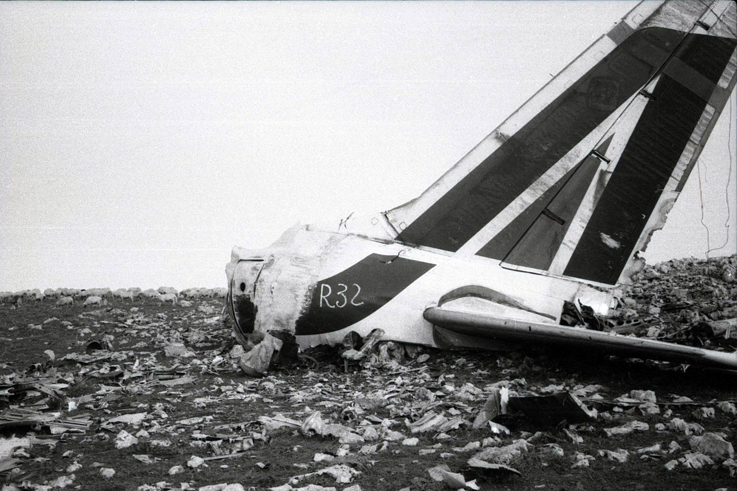 Последствия авиационной катастрофы самолёта Douglas DC-8 близ Палермо